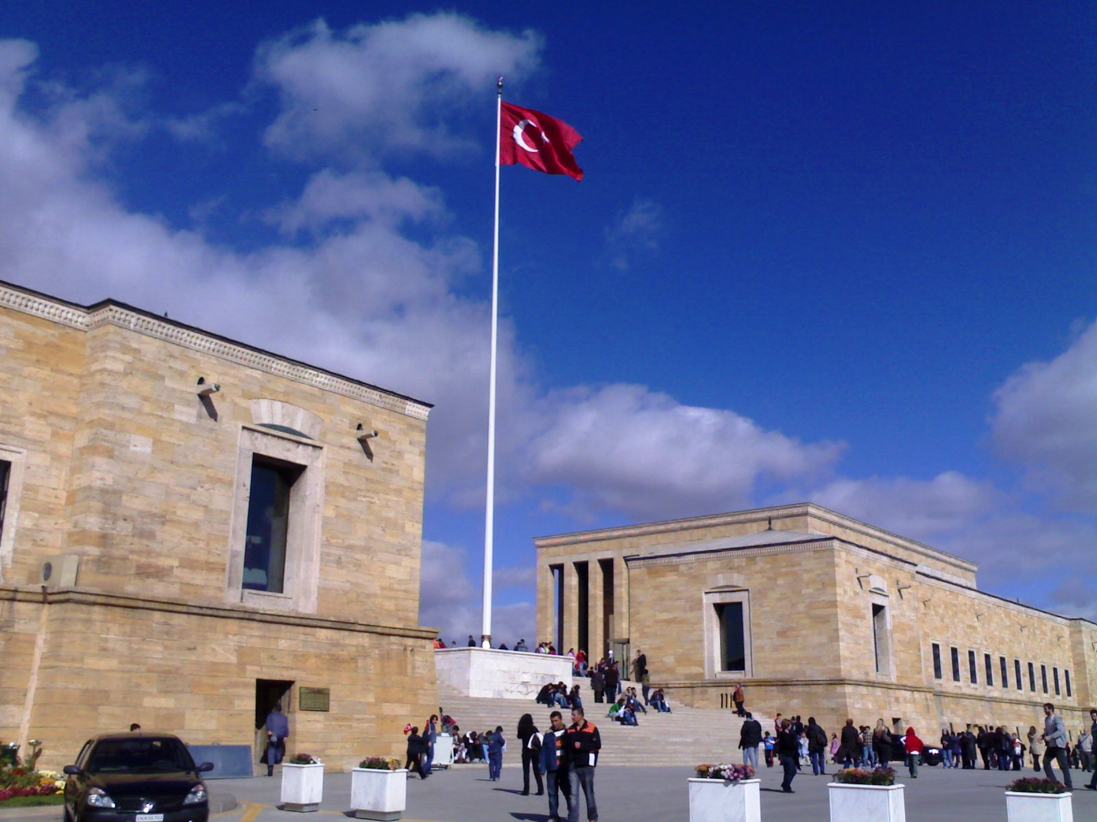 Anıtkabir tören alanından çıkış kapısı